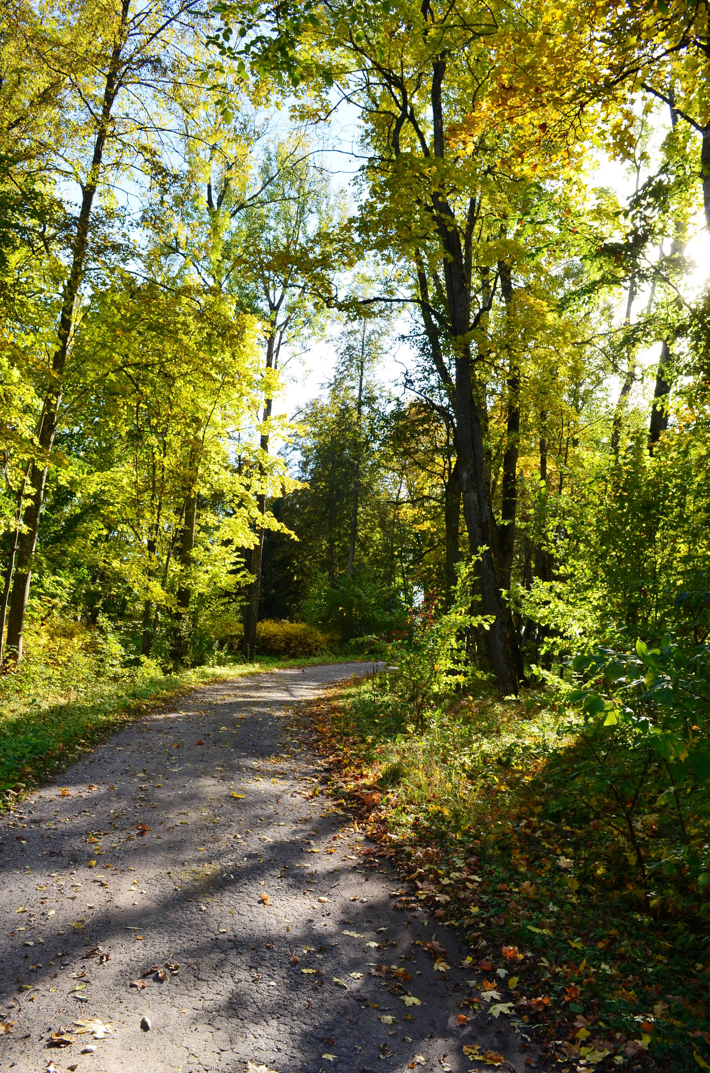 Terespolio dvaro parkas, Gudžiūnų sen., Kėdainių raj.